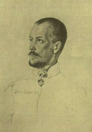 Görgey Artúr arcképe, 1849.